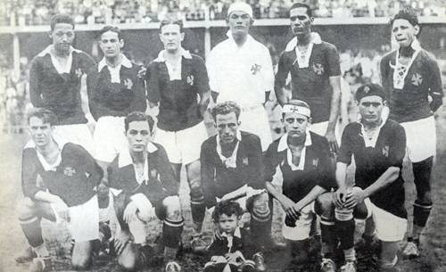 CR Vasco da Gama - Campeão Carioca 1929: Back: Tinoco, Brilhante, Itália, Jaguaré, Fausto e Mola; Front: Pascoal, Oitenta-e-Quatro, Russinho, Mário Mattos e Santana